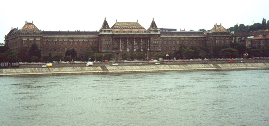 BME "K" épület - saját fotó